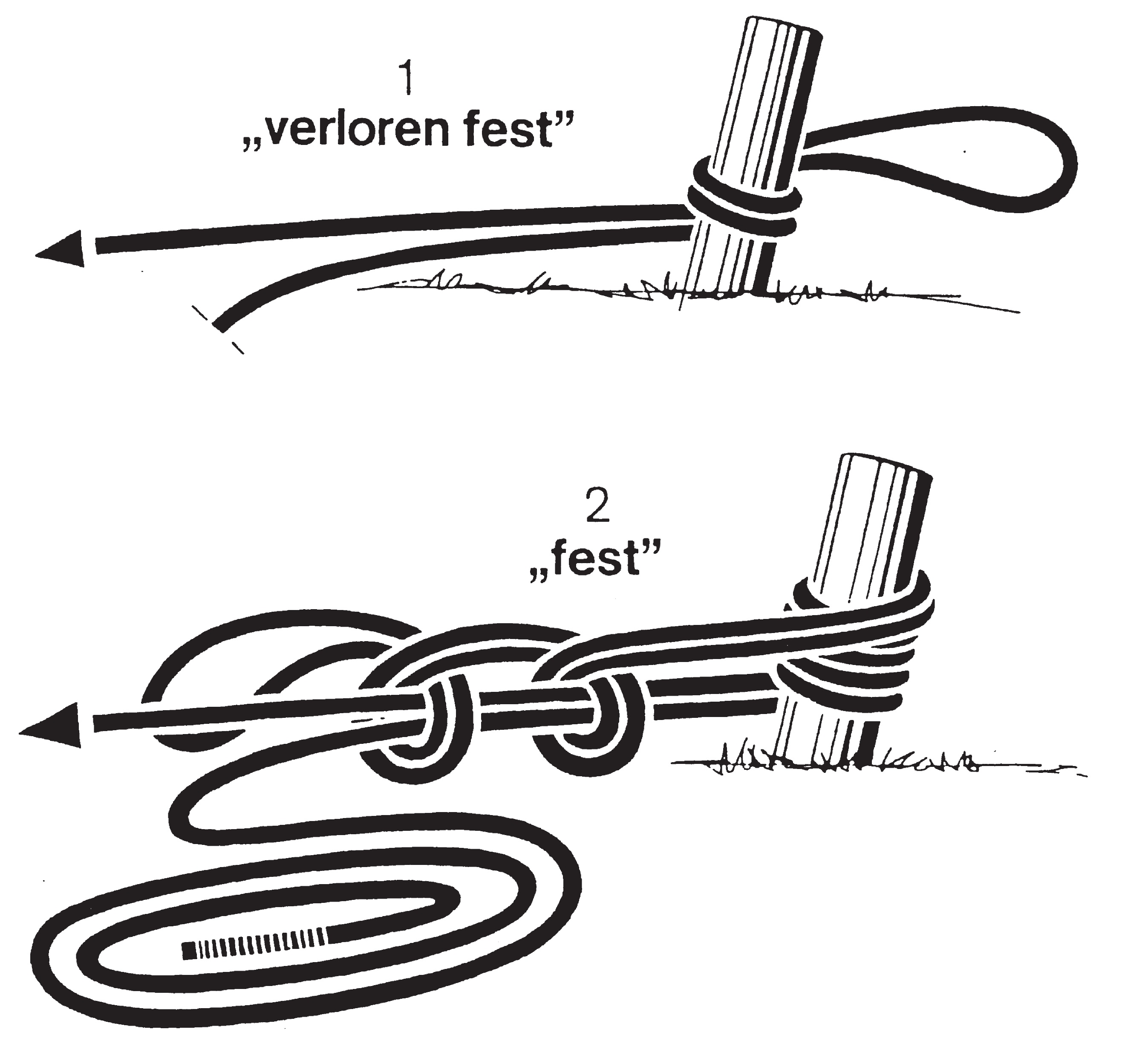 Festlegerbund an einem Poller